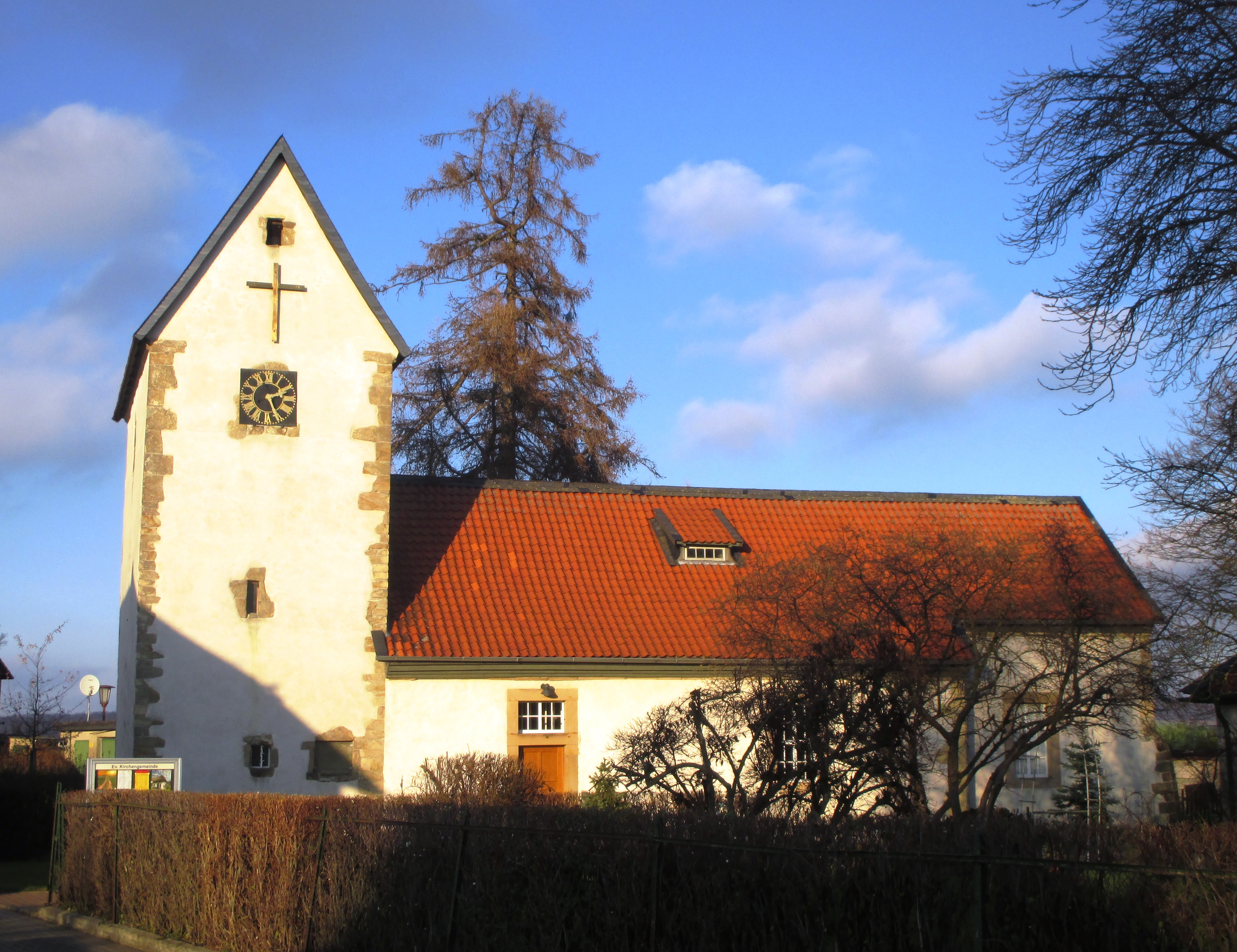 evangelische Kirche in Klein Heere, Gemeinde Heere, Landkreis Wolfenbüttel